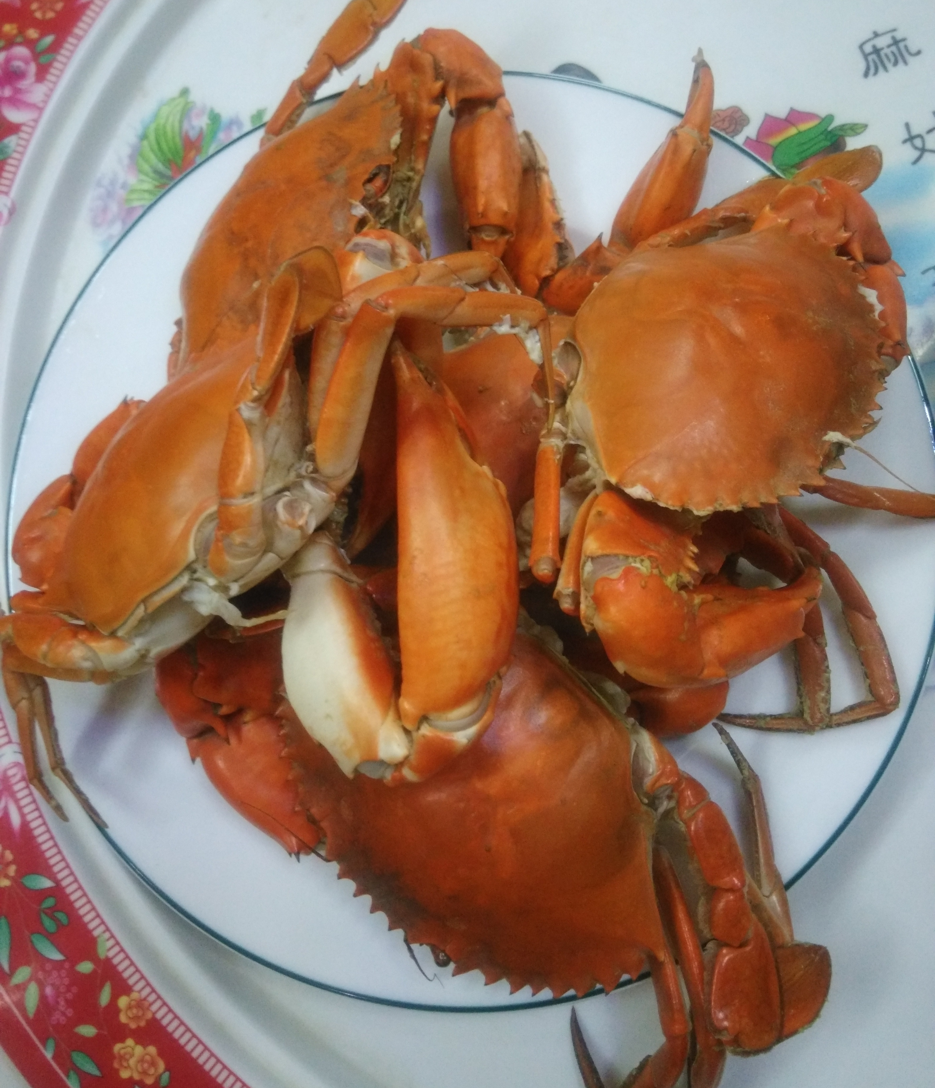 Hình chụp bằng máy ảnh cá nhân hình con cua lửa